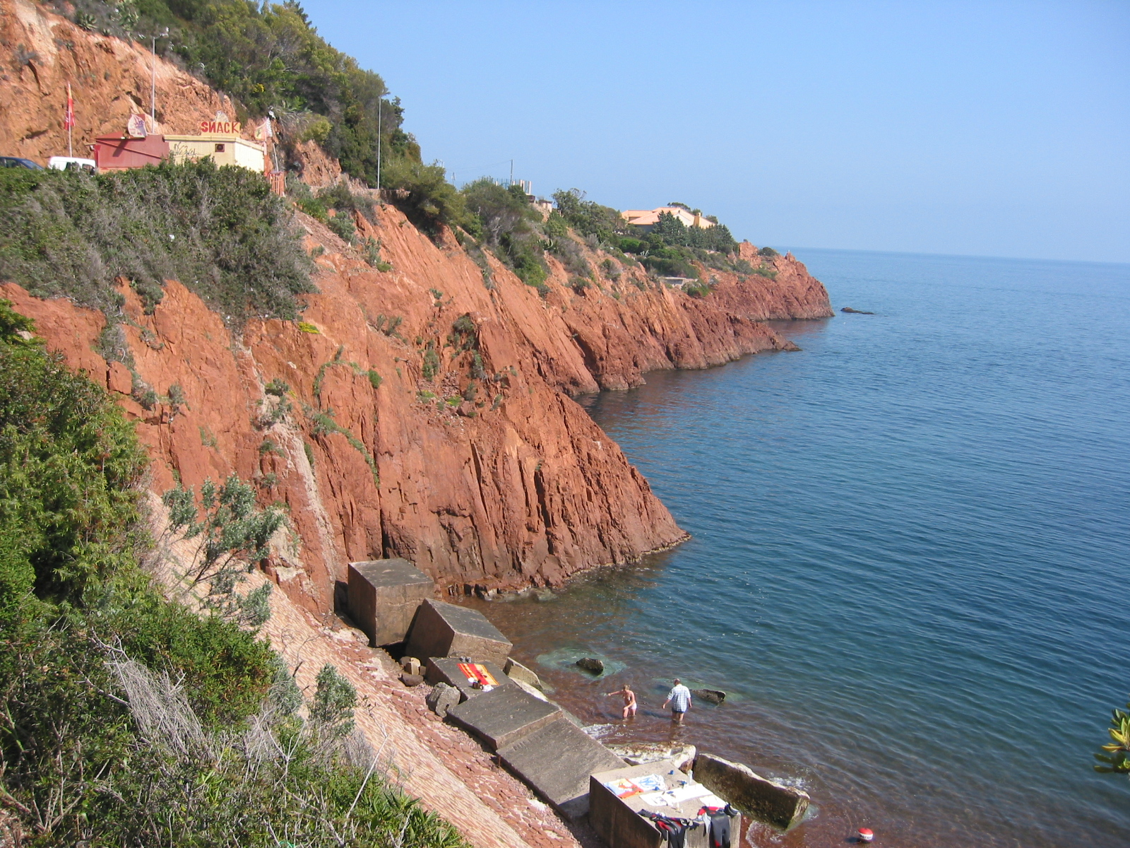 Le Massif de l’Estérel, Alpes-Maritimes, France Photo prise le 2 avril 2006 Auteur : Jddmano